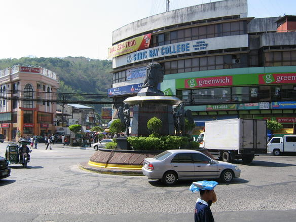 Ulo ng Apo - Rotunda Olongapo City